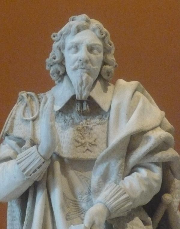 Duc Charles de La Vieuville par Gilles Guérin